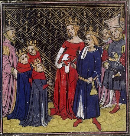 Clovis Ier et sa famille. Grandes Chroniques de France, XIVème siècle. Fol. 13v.